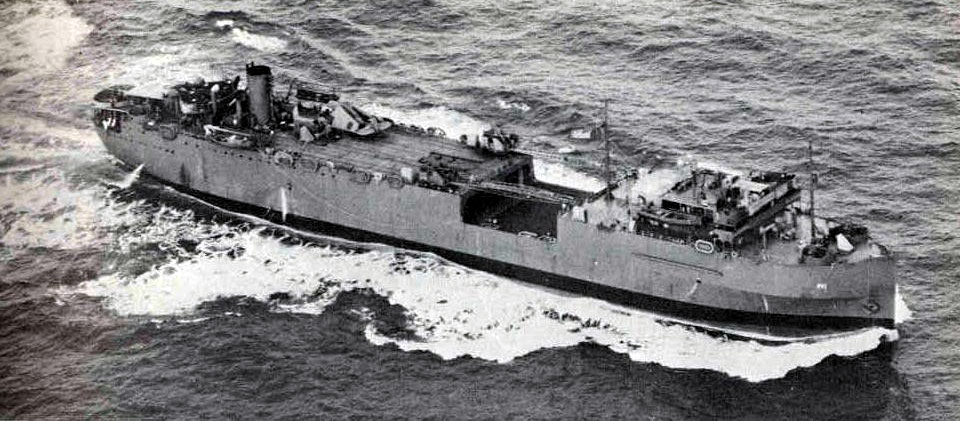 USS Kitty Hawk (APV-1) underway, October 1942.